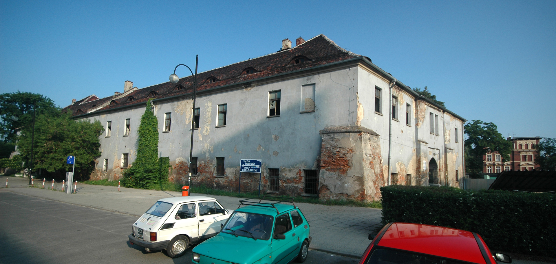 przedzamcze, ob. szpital Kędzierzyn-Koźle, ul. Pamięci Sybiraków 11, Kędzierzyn-Koźle 04.1964.